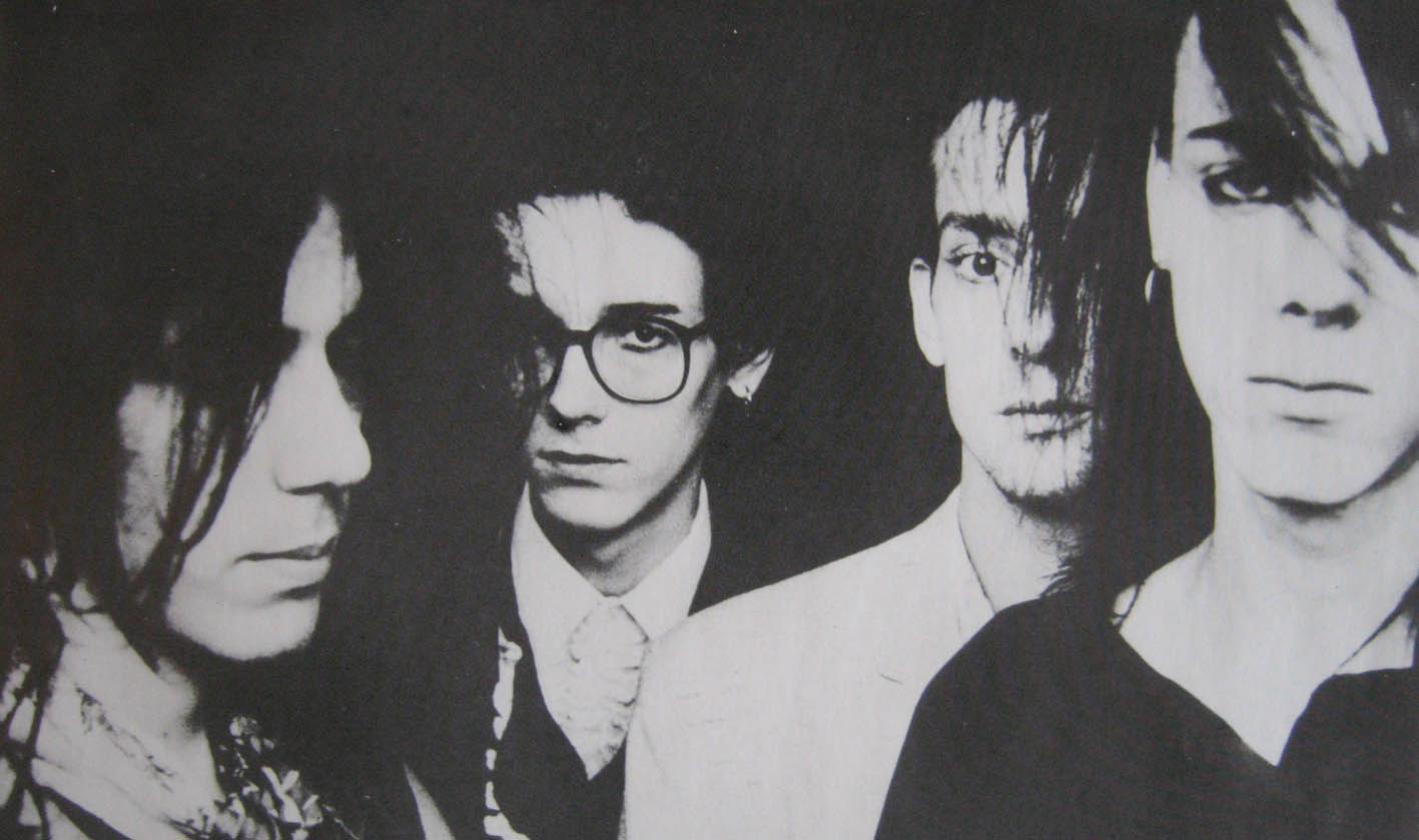 Life On Grey Eigenwerk Foto: Ruud van den Houte